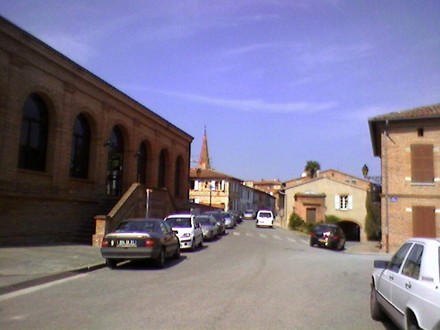 Photo du village de Fourquevaux